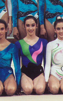 Mónica Ferrández en el Gimnasio Moscardó (Madrid) en 1991.